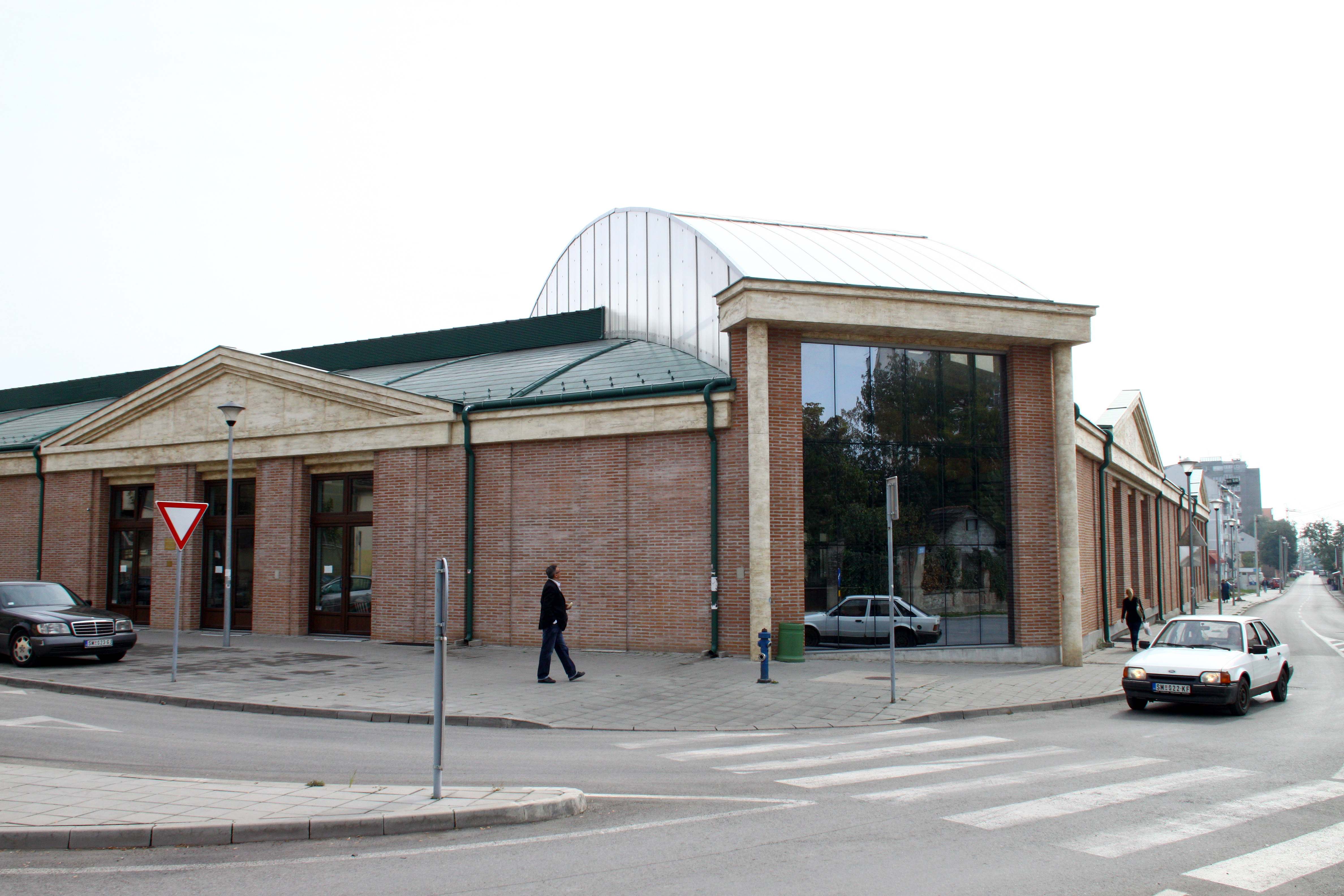 Српски (ћирилица): Визиторски центар Сирмијум, Сремска Митровица, Србија.